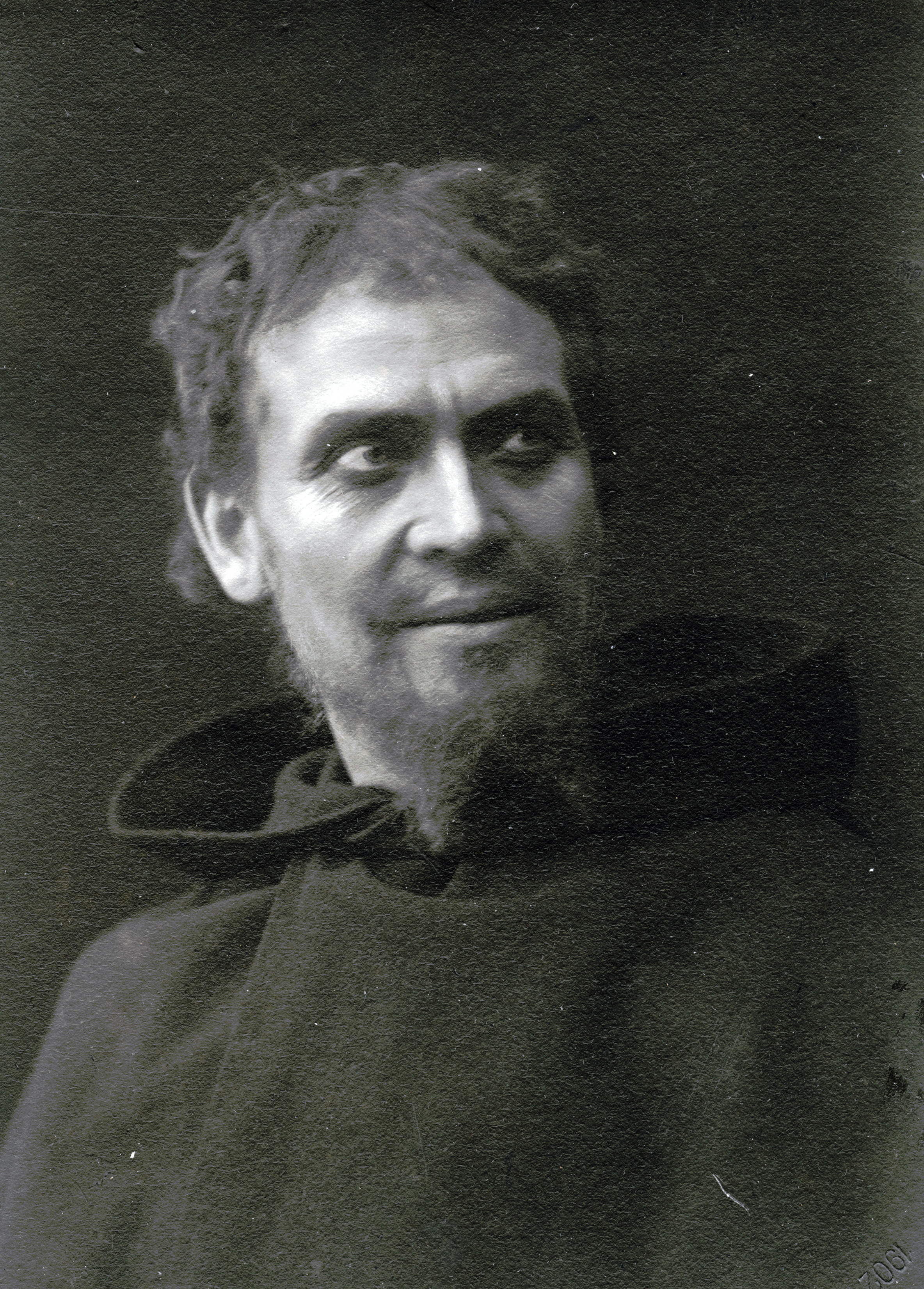 Frans Envall som Tiggaren i Till Damaskus, Dramatiska teatern 1900